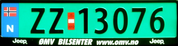 Skilt til varebiler.